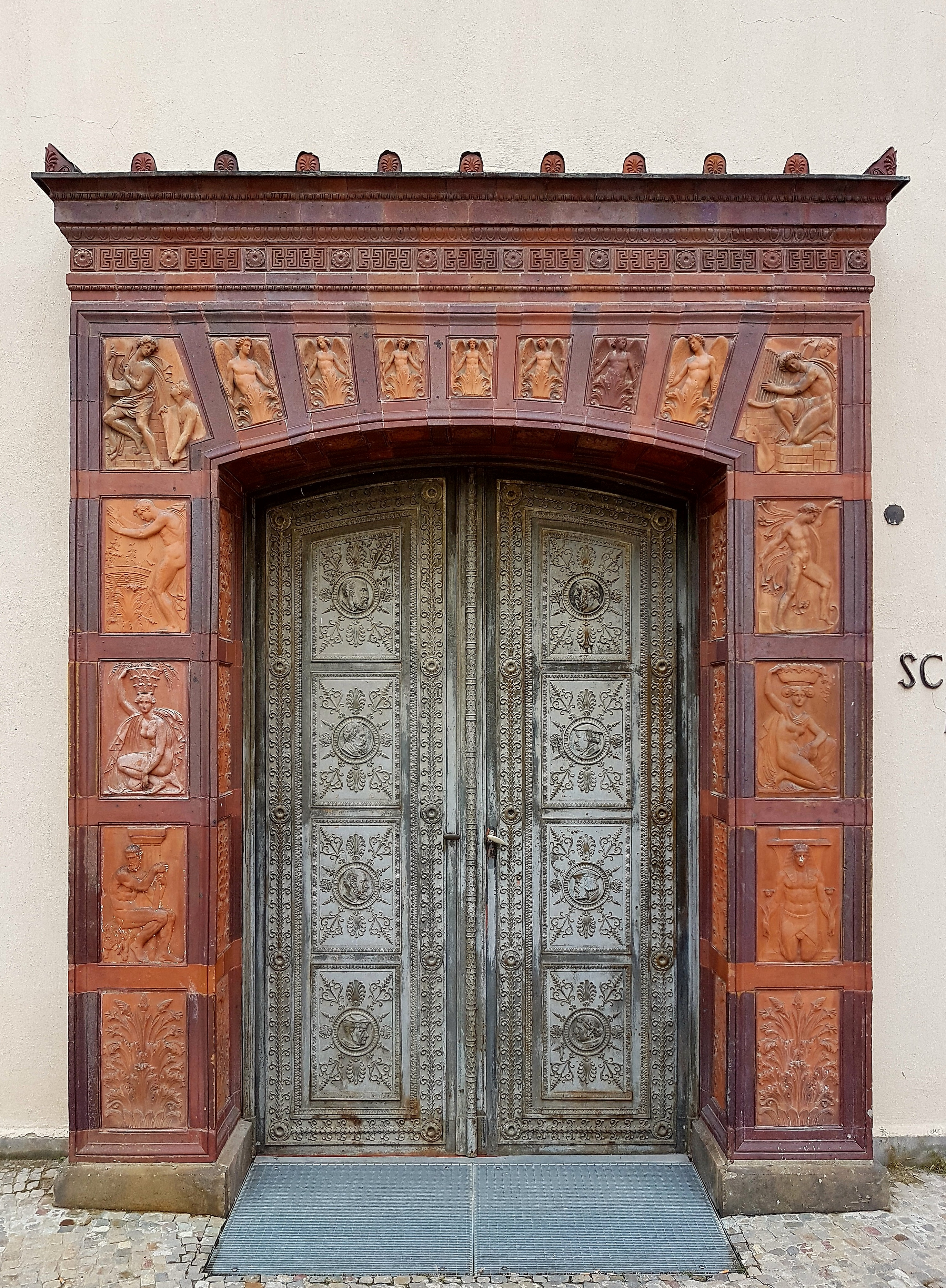 Das ehemalige linke Portal der Bauakademie dient heute der Schinkelklause als Eingangspforte. Doch obwohl diese gar nicht so weit vom Standort der Bauakademie entfernt ist, findet sich hier kein Hinweis auf den Ursprung dieser so reich verzierten Tür.